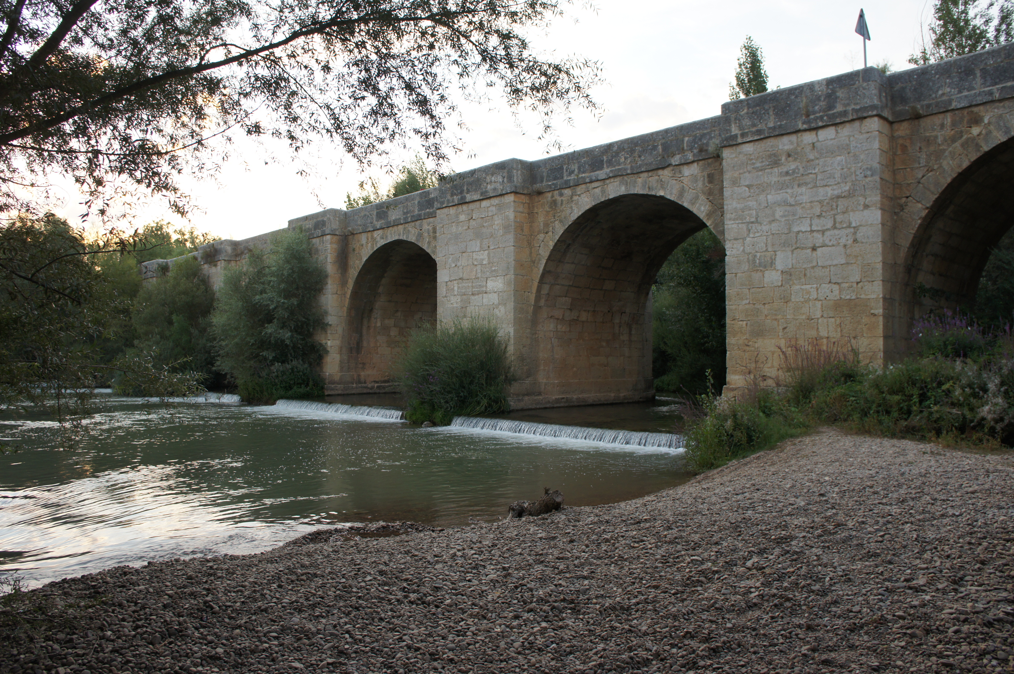 Puente sobre el río Pisuerga.